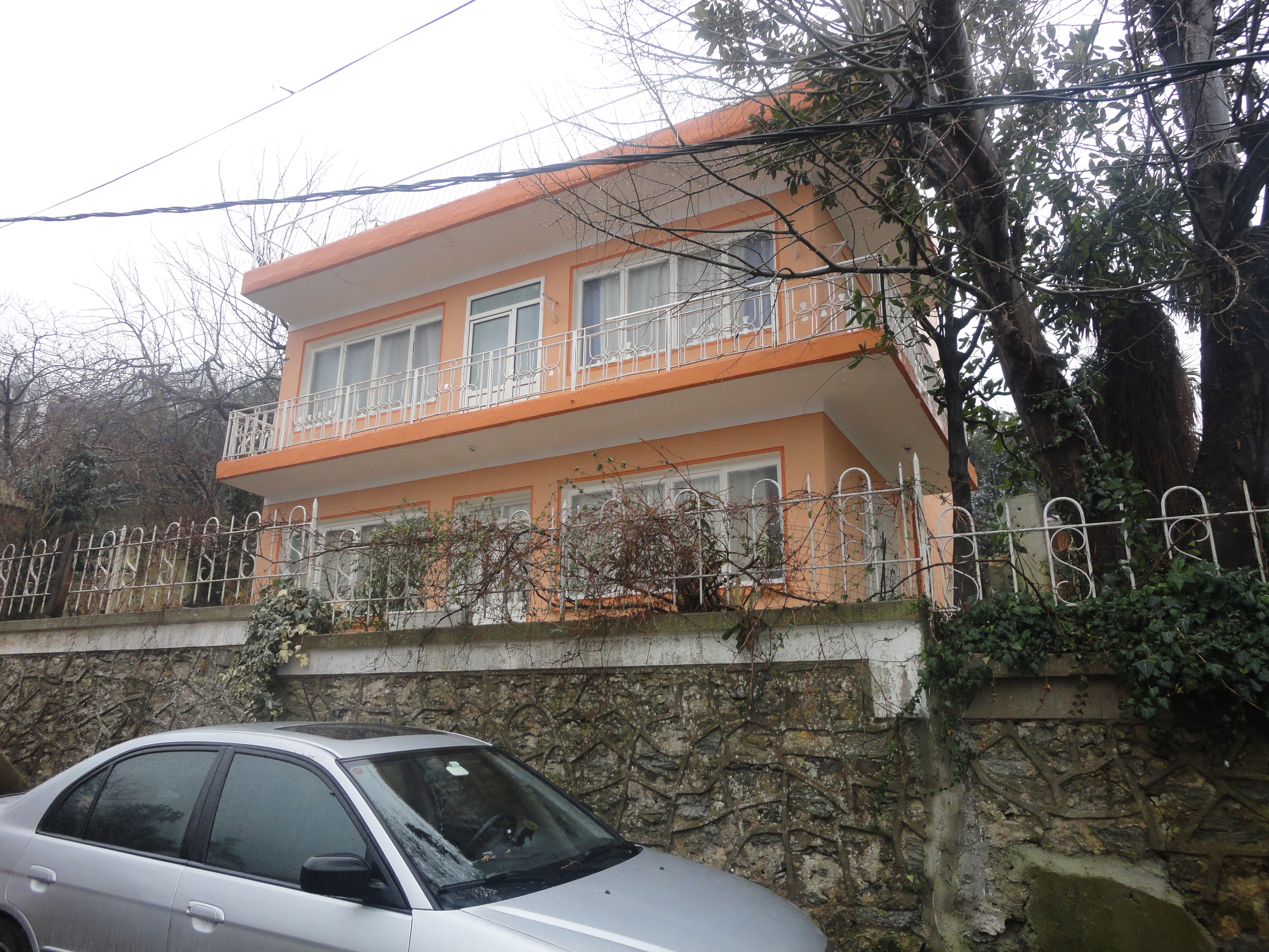 Leyla ile Mecnun'un çekim mekanlarından biri olan İskender ve Mecnun'un evi.